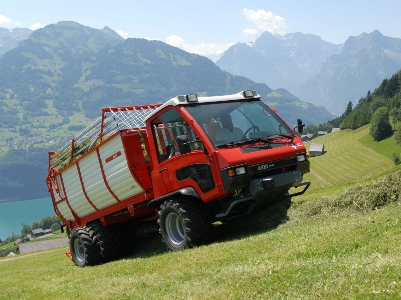 Aebi TP48P